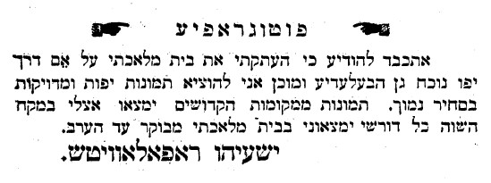 מודעת פרסום של he:ישעיהו רפאלוביץ